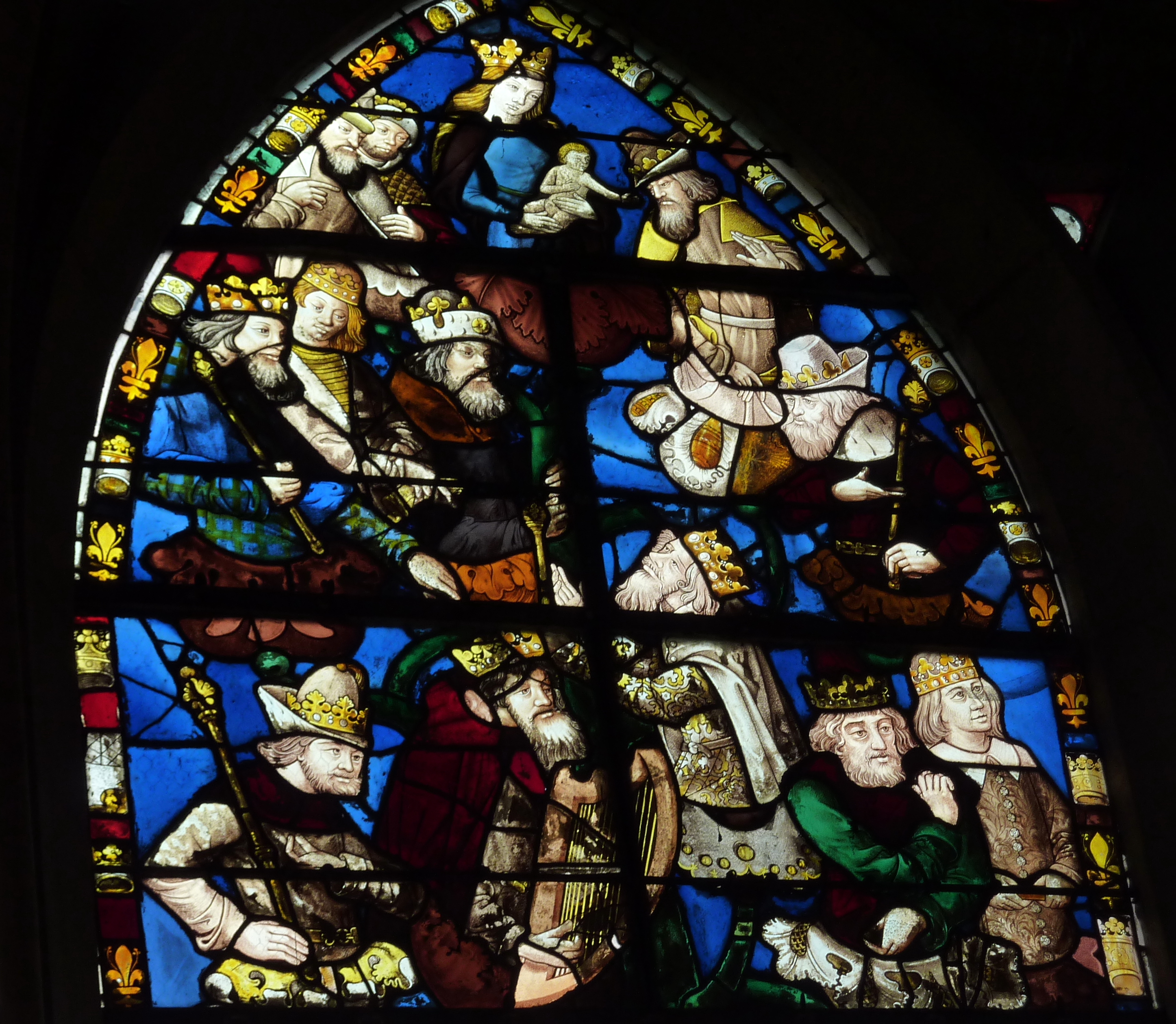 Ehemalige Kollegiatskirche Saint-Martin in Champeaux (Seine-et-Marne) im Département Seine-et-Marne in der Region Île-de-France (Frankreich), Bleiglasfenster aus dem 16. Jahrhundert, Darstellung: Wurzel Jesse (Ausschnitt). Fenster n° 13 nach der Numerierung von G. Leroy, 1896 (siehe Plan).